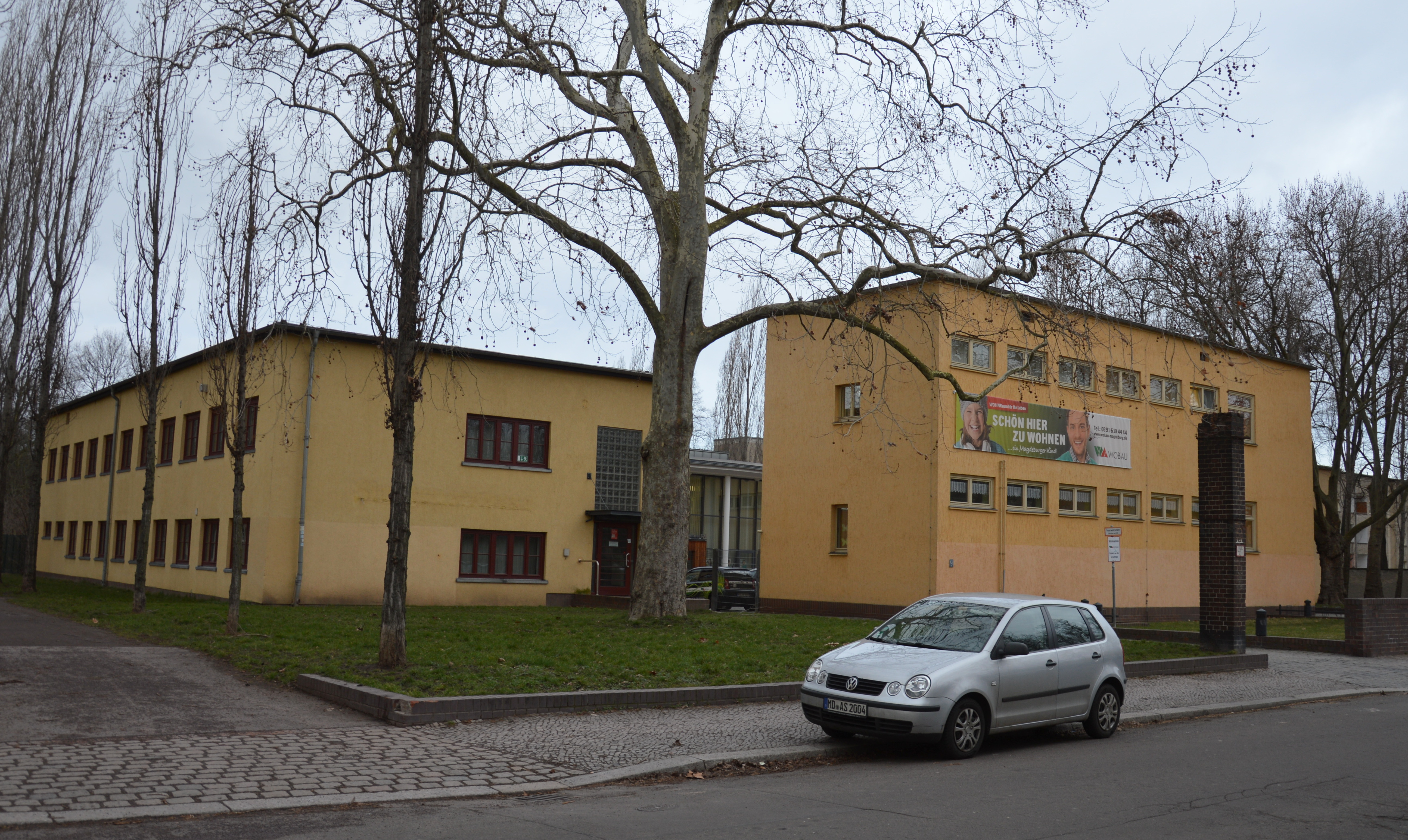 Flechtinger Straße in Magdeburg